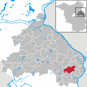 Lindendorf in Brandenburg (Country) - District Märkisch-Oderland